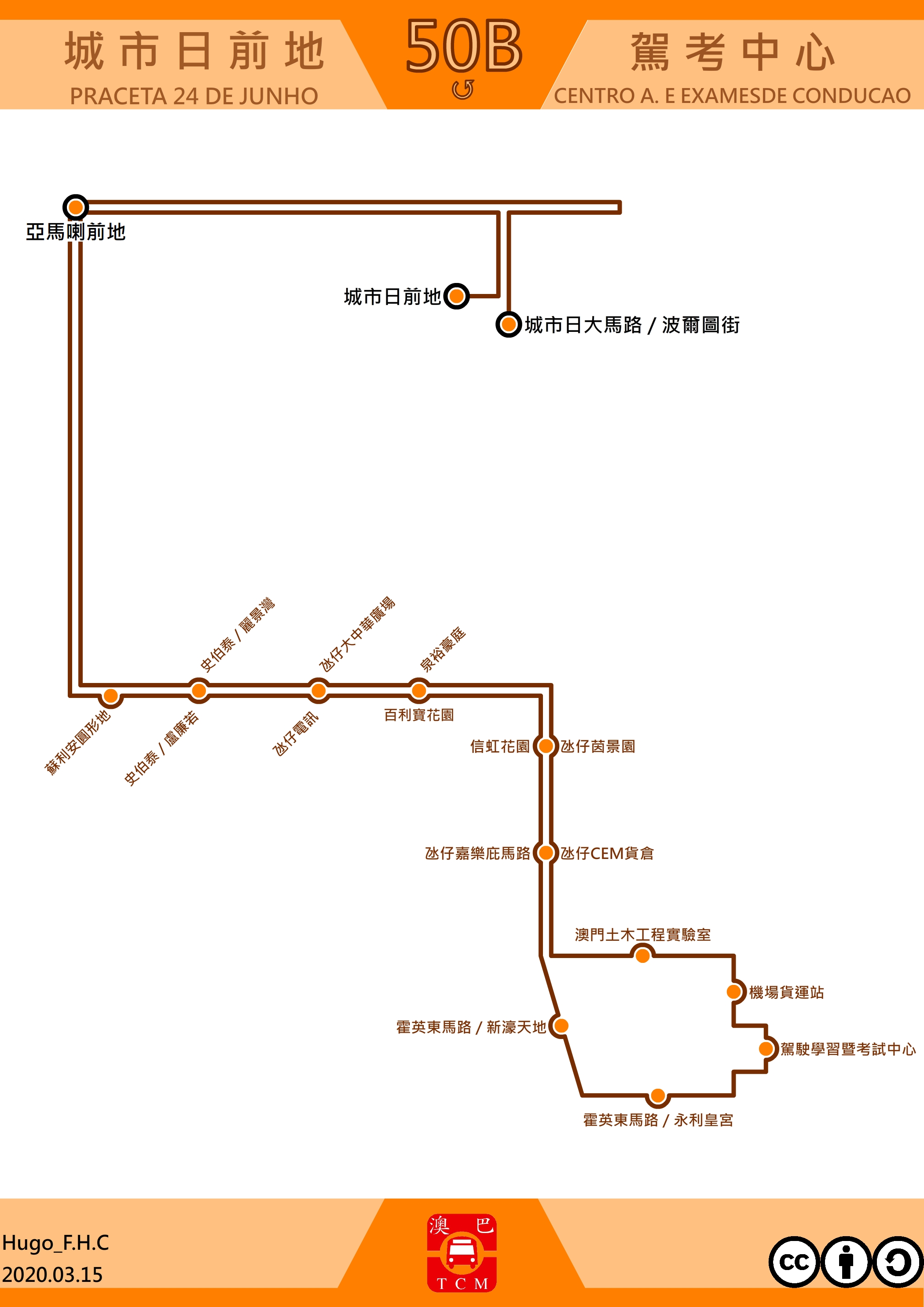 澳門巴士50B走線圖